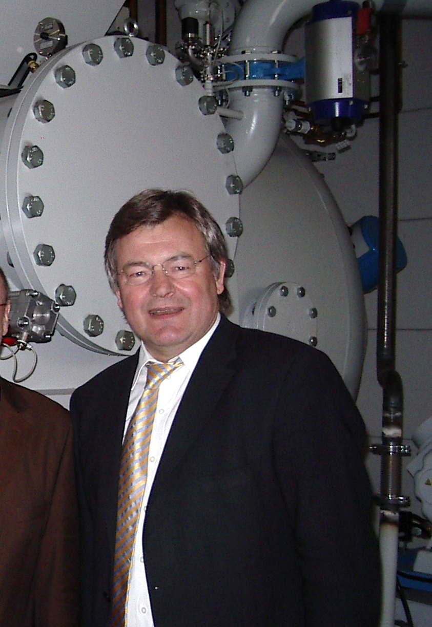 Hermann Josef Schulte, Geschäftsführender Gesellschafter der HJS Emission Technology GmbH & Co KG